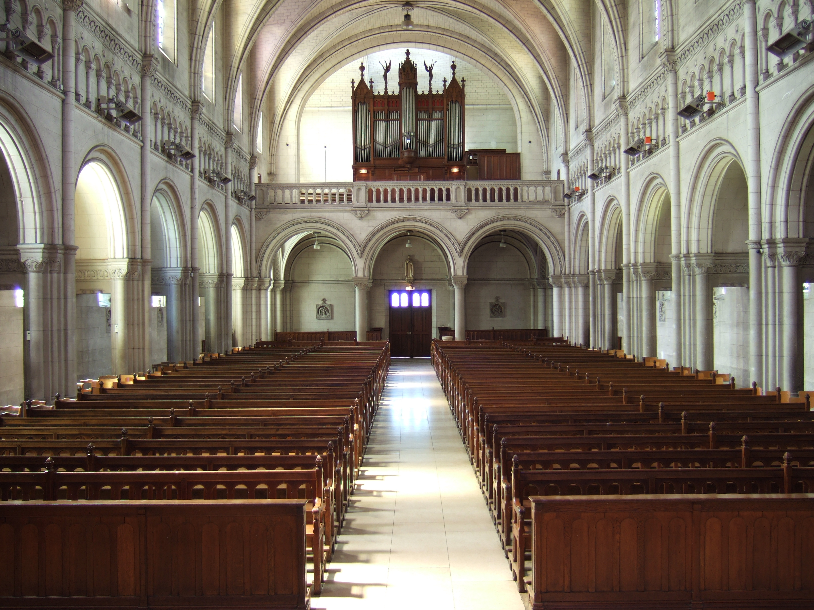 Orgue de la chapelle Jean-Baptiste de La Salle de Rouen (76) - France